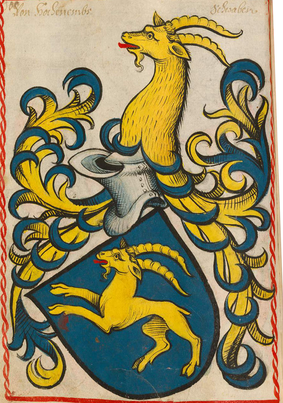 Scheibler'sches Wappenbuch, älterer Teil Hohenems